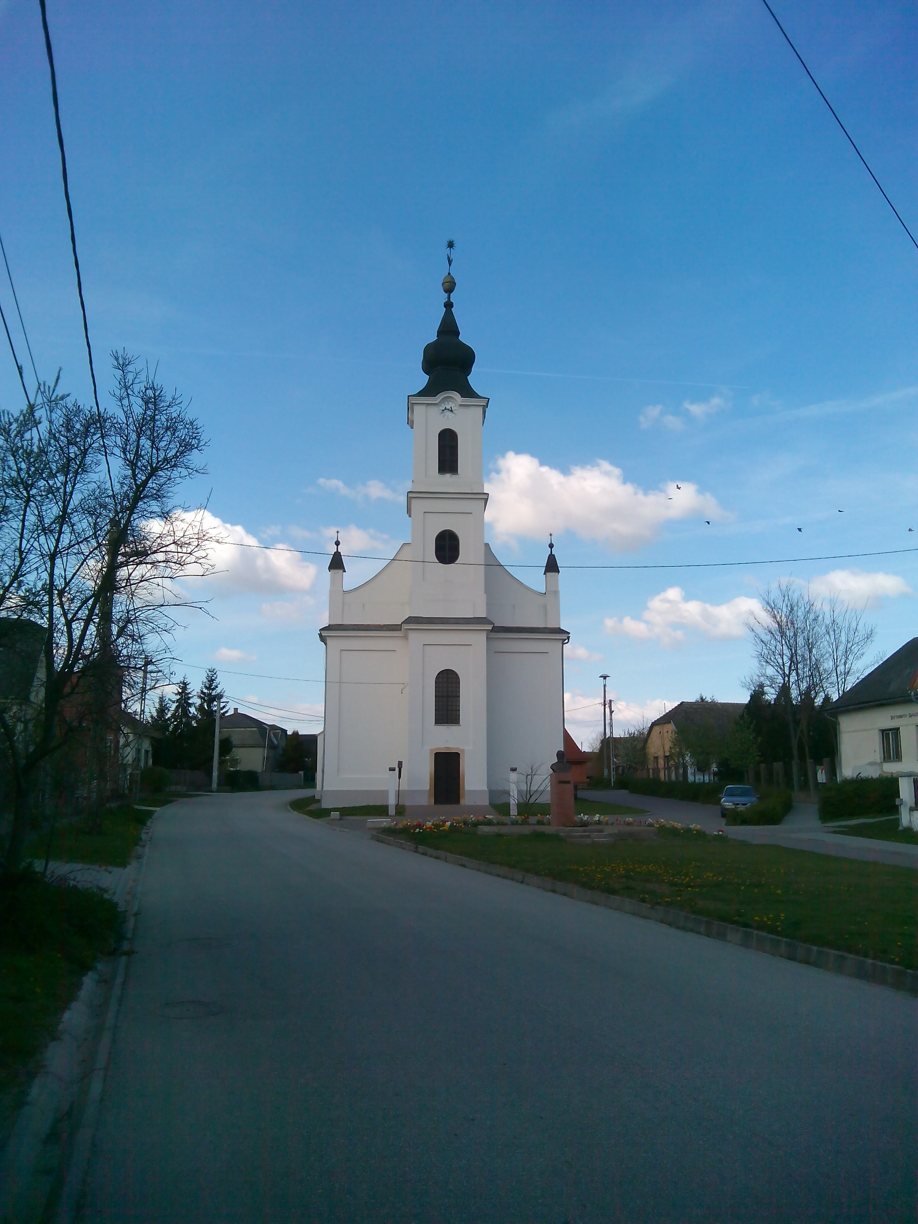 Makád református templom